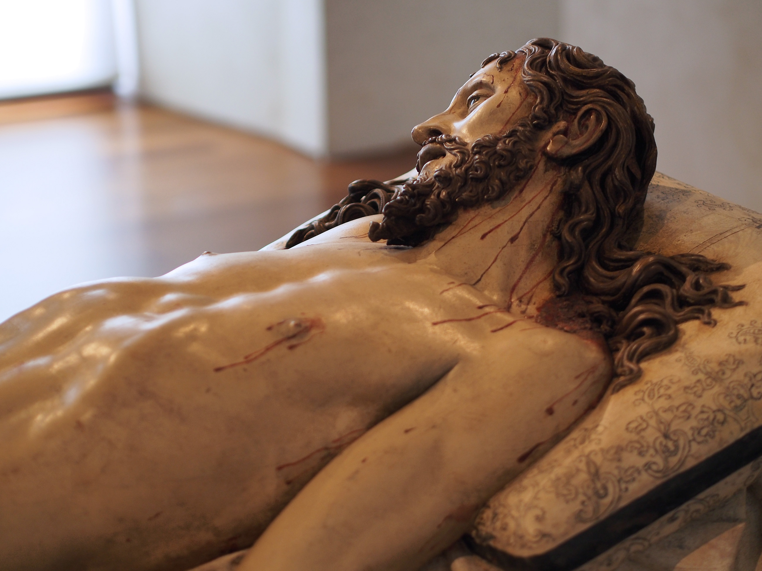 Cristo yacente, madera policromada, c.1627, de Gregorio Fernández (1576-1636). Museo Nacional de Escultura, Valladolid.